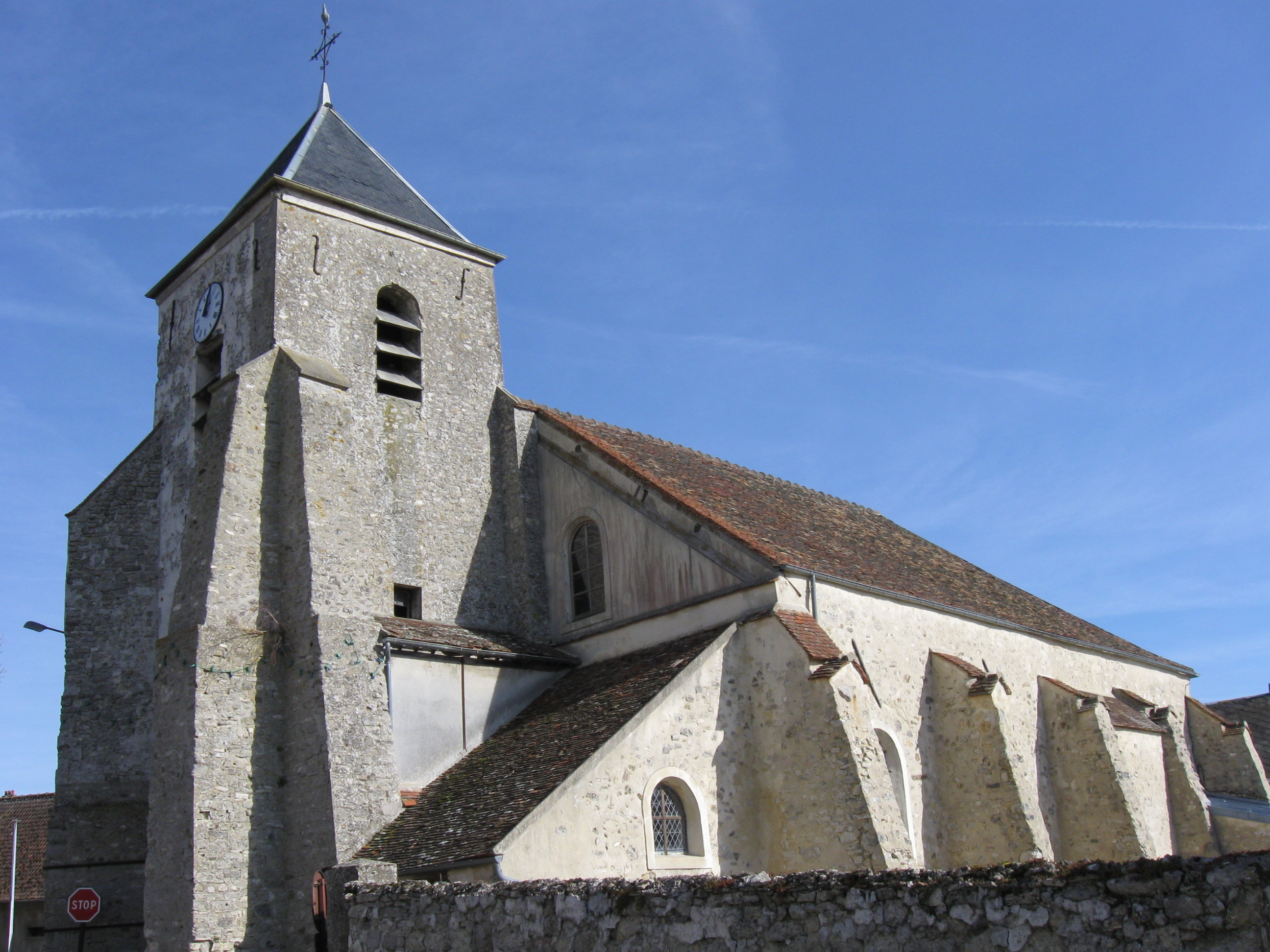 Église Saint-Jean-Porte-Latine de Douy-la-Ramée. (Seine-et-Marne, région Île-de-France).